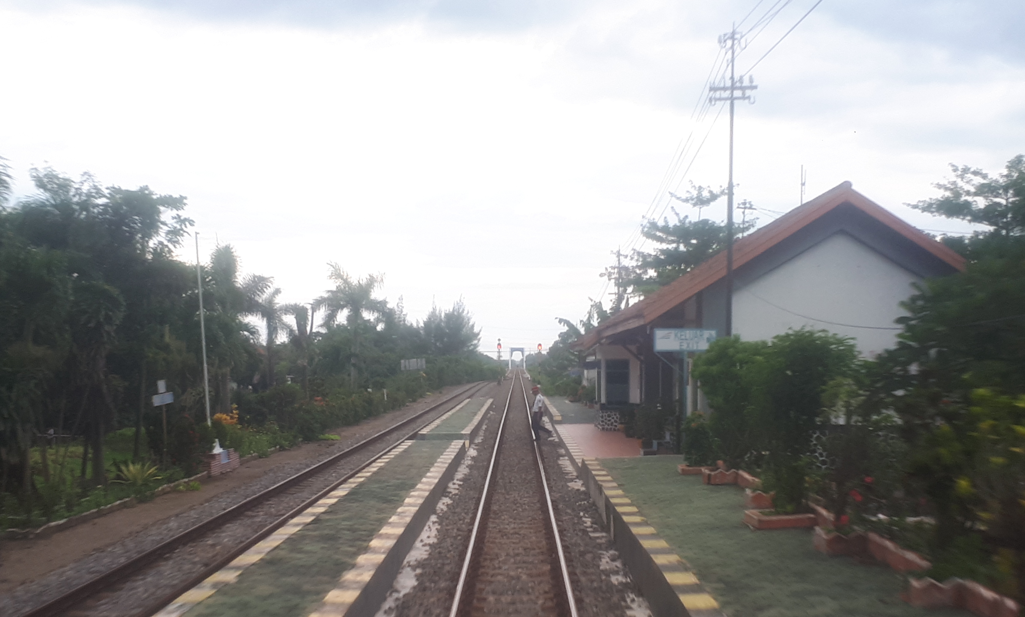 Emplasemen Stasiun Purwoasri pada tahun 2020